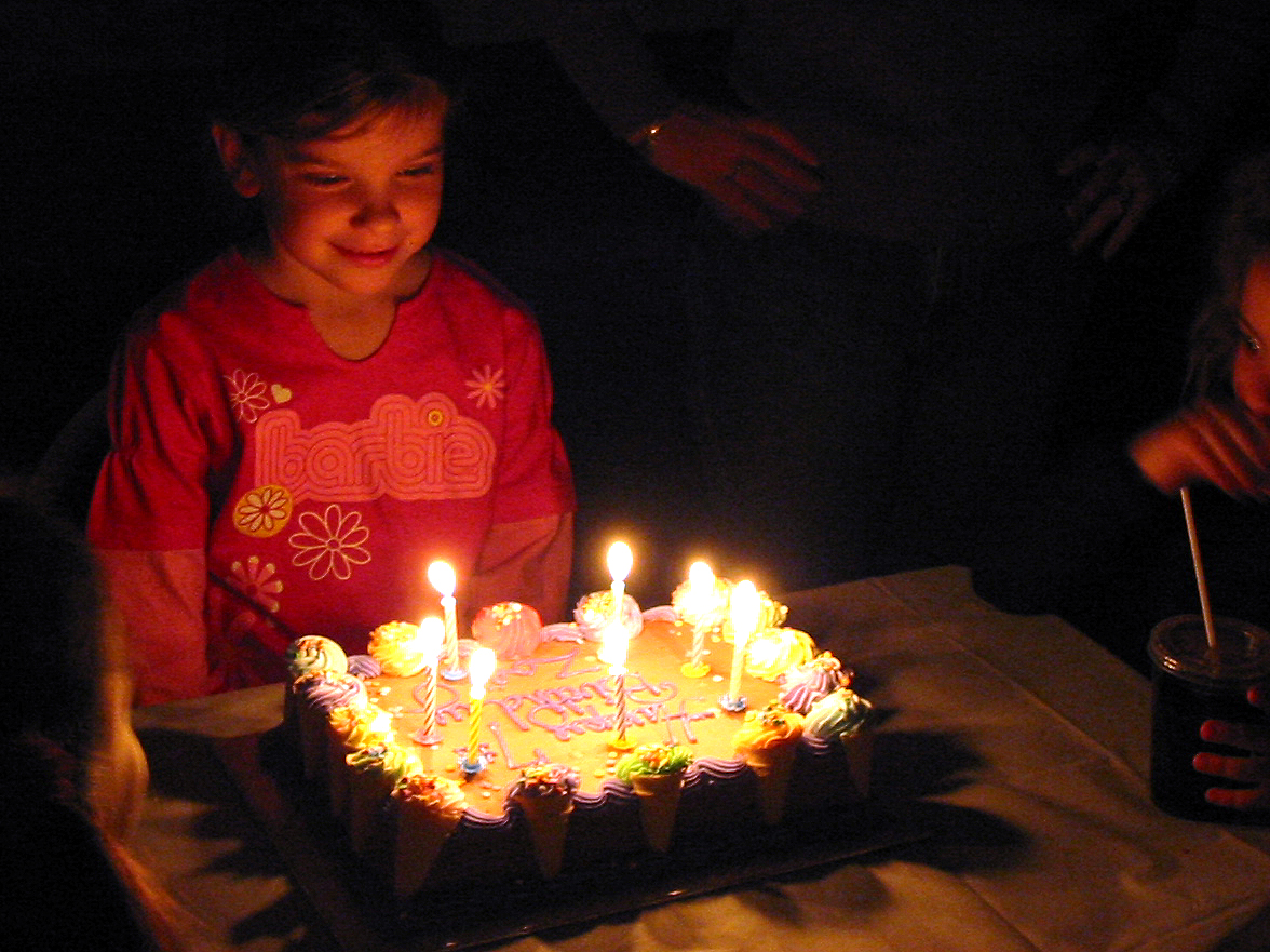 Making a wishIMG_4540